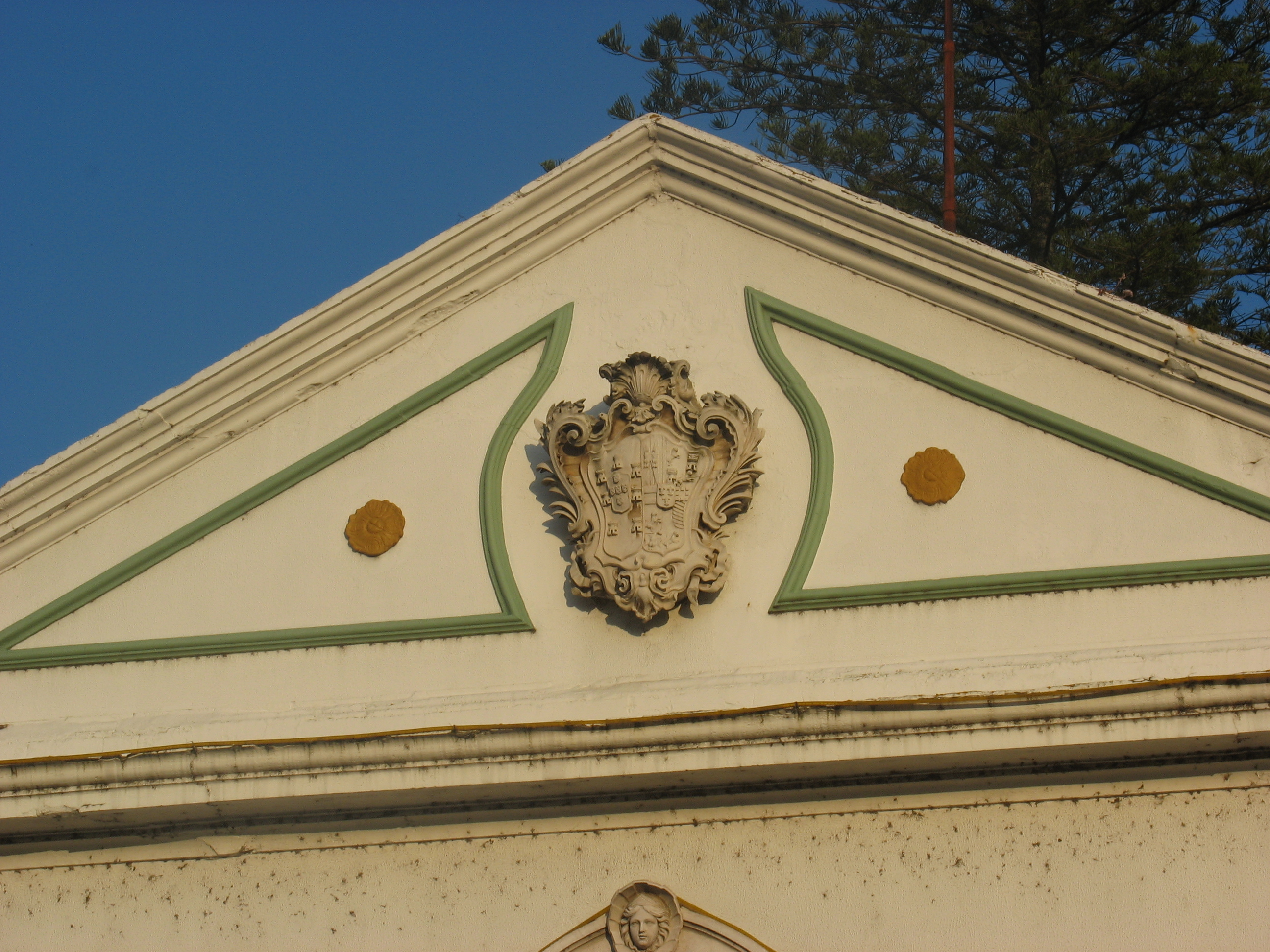 Chamusca (Portugal) - frontão dos paços do concelho